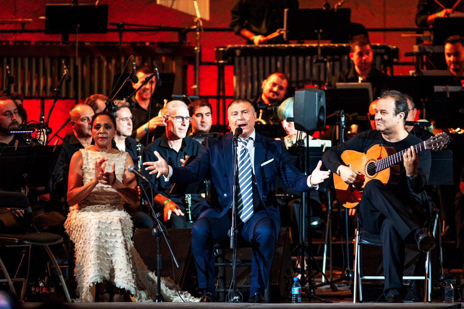 El guitarrista y compositor jerezano Gerardo Núñez presentó ayer su último trabajo en concierto junto a la Banda Sinfónica Municipal de Madrid, en el que participaron también Antonio Carbonell al cante y Ángel Sánchez ‘Cepillo’ en la percusión, colaboradores habituales de Núñez, así como la bailaora Carmen Cortés como artista invitada.